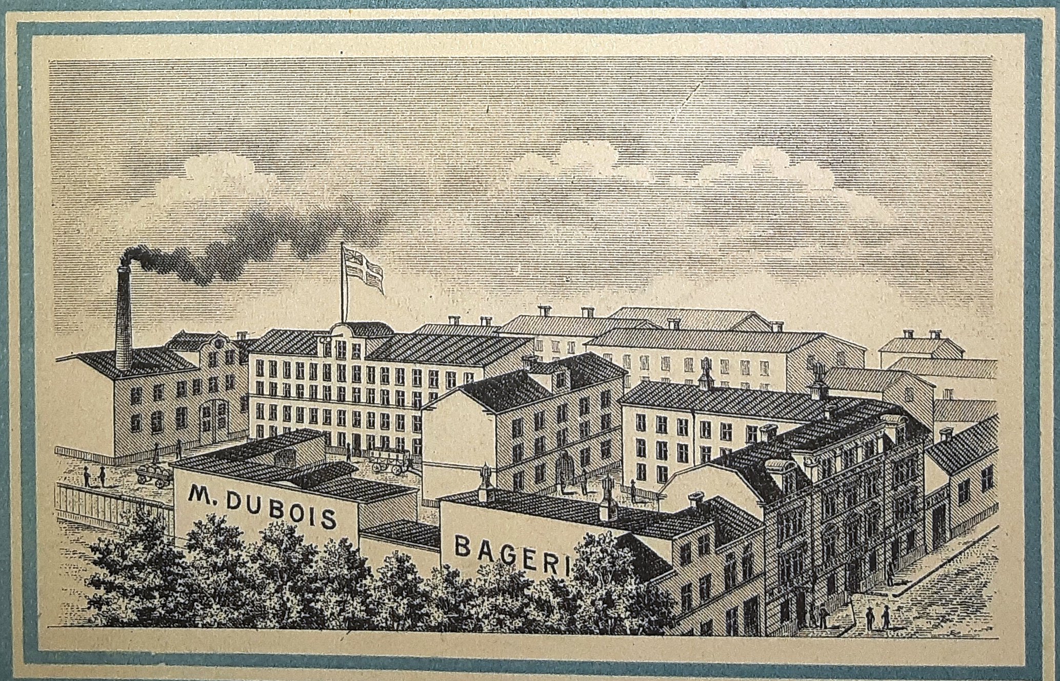 Foto av en perspektivskiss i en priskurant för Dubois produkter.